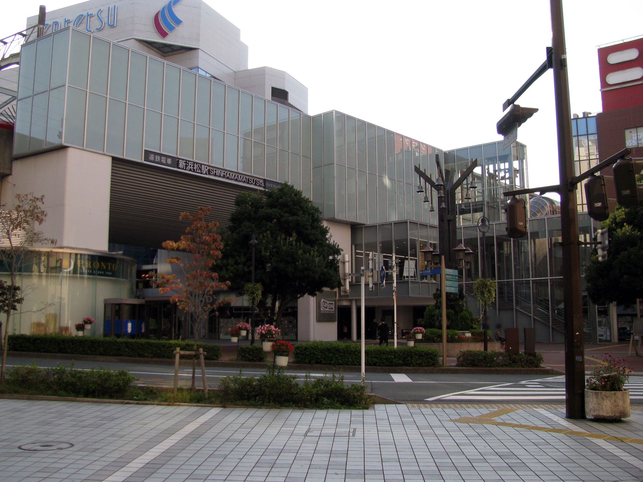 遠州鉄道新浜松駅